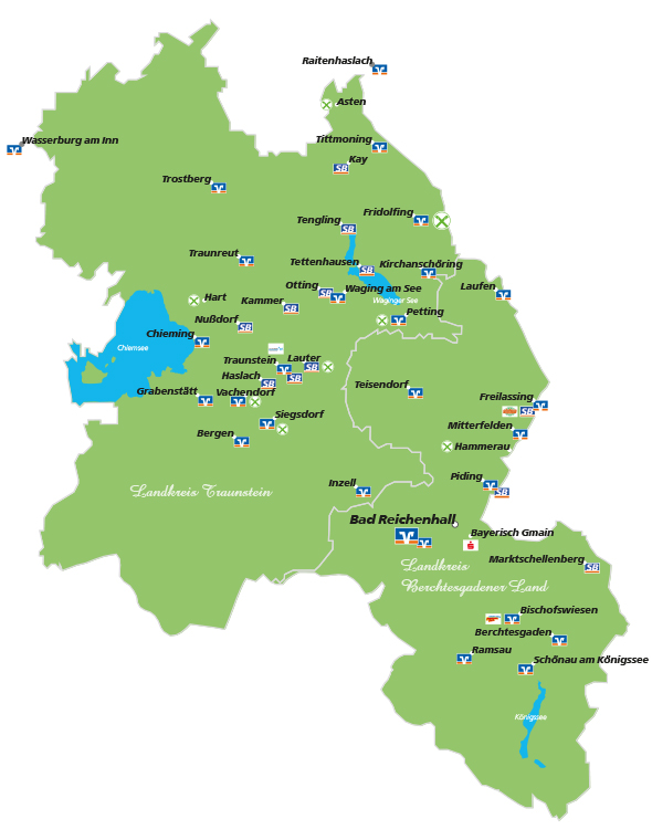 Geschäftsgebiet